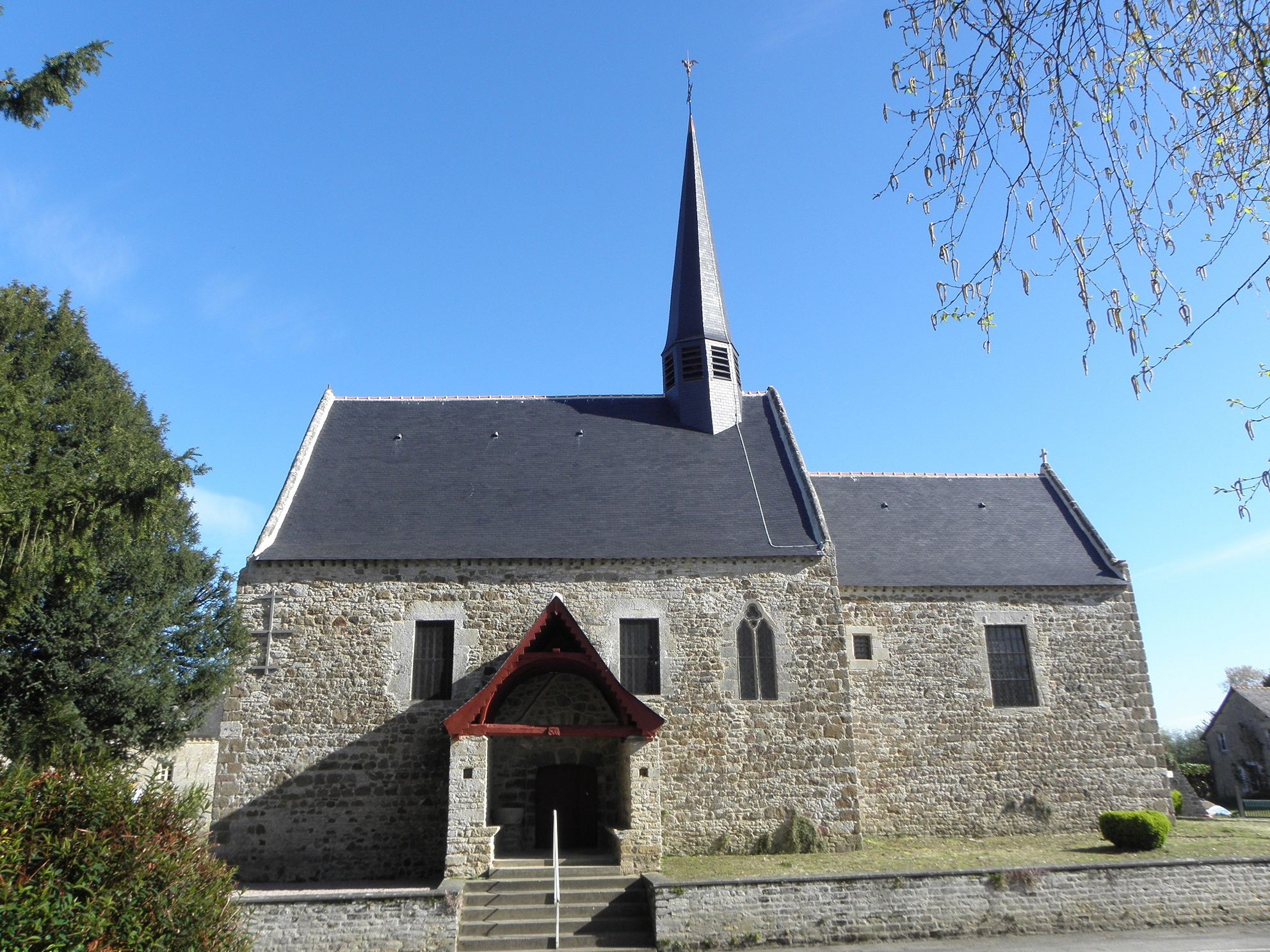 Église Sainte-Agnès de Tréfumel (22). Flanc sud.